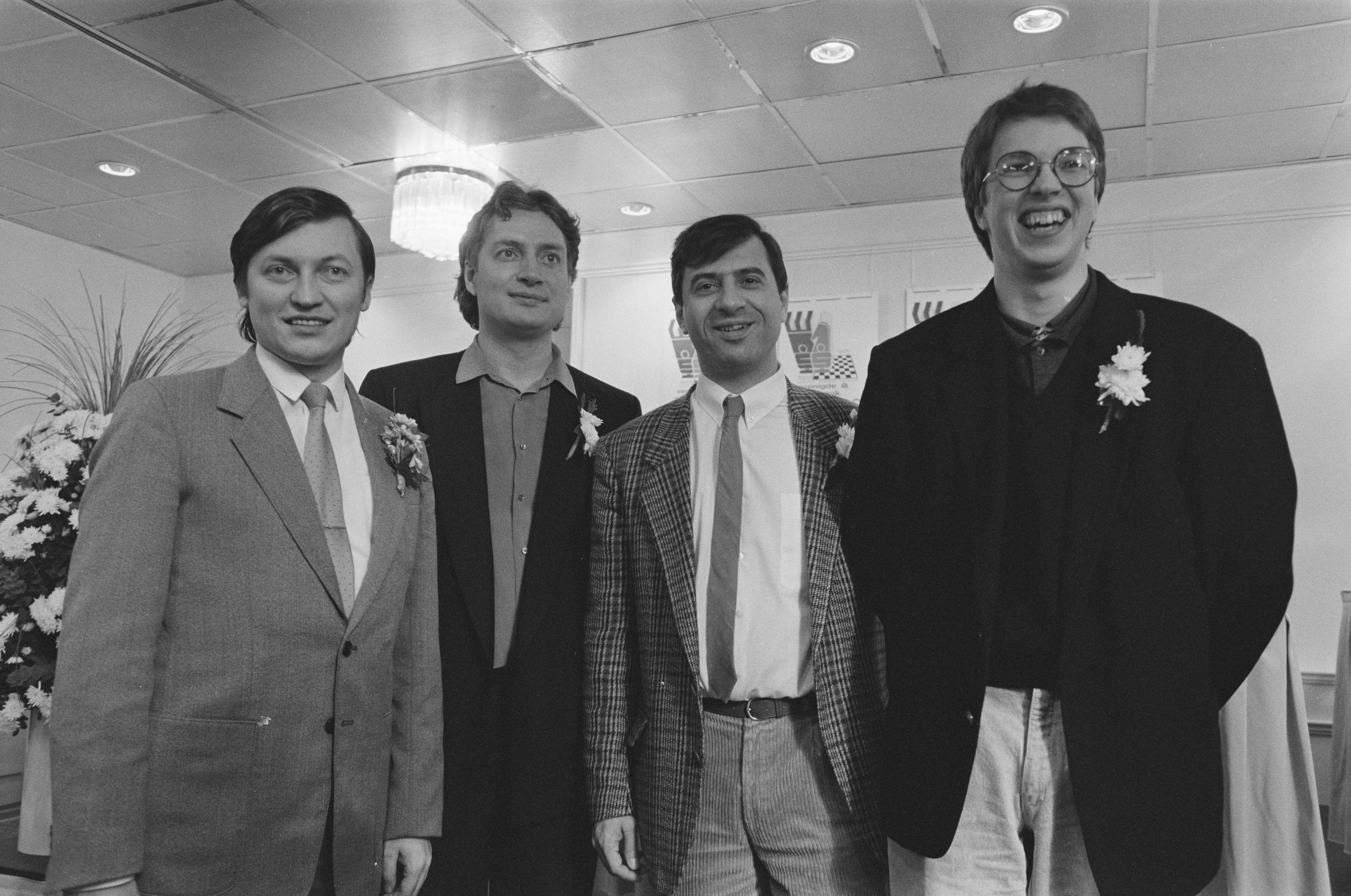 Collectie / Archief : Fotocollectie Anefo Reportage / Serie : [ onbekend ] Beschrijving : Euwe-schaakvierkamp v.l.n.r. Karpov, Timman, Ljubojevic, Short Datum : 9 maart 1988 Trefwoorden : schaken Persoonsnaam : Karpov, Anatoli Fotograaf : Croes, Rob C. / Anefo Auteursrechthebbende : Nationaal Archief Materiaalsoort : Negatief (zwart/wit) Nummer archiefinventaris : bekijk toegang 2.24.01.05 Bestanddeelnummer : 934-2059